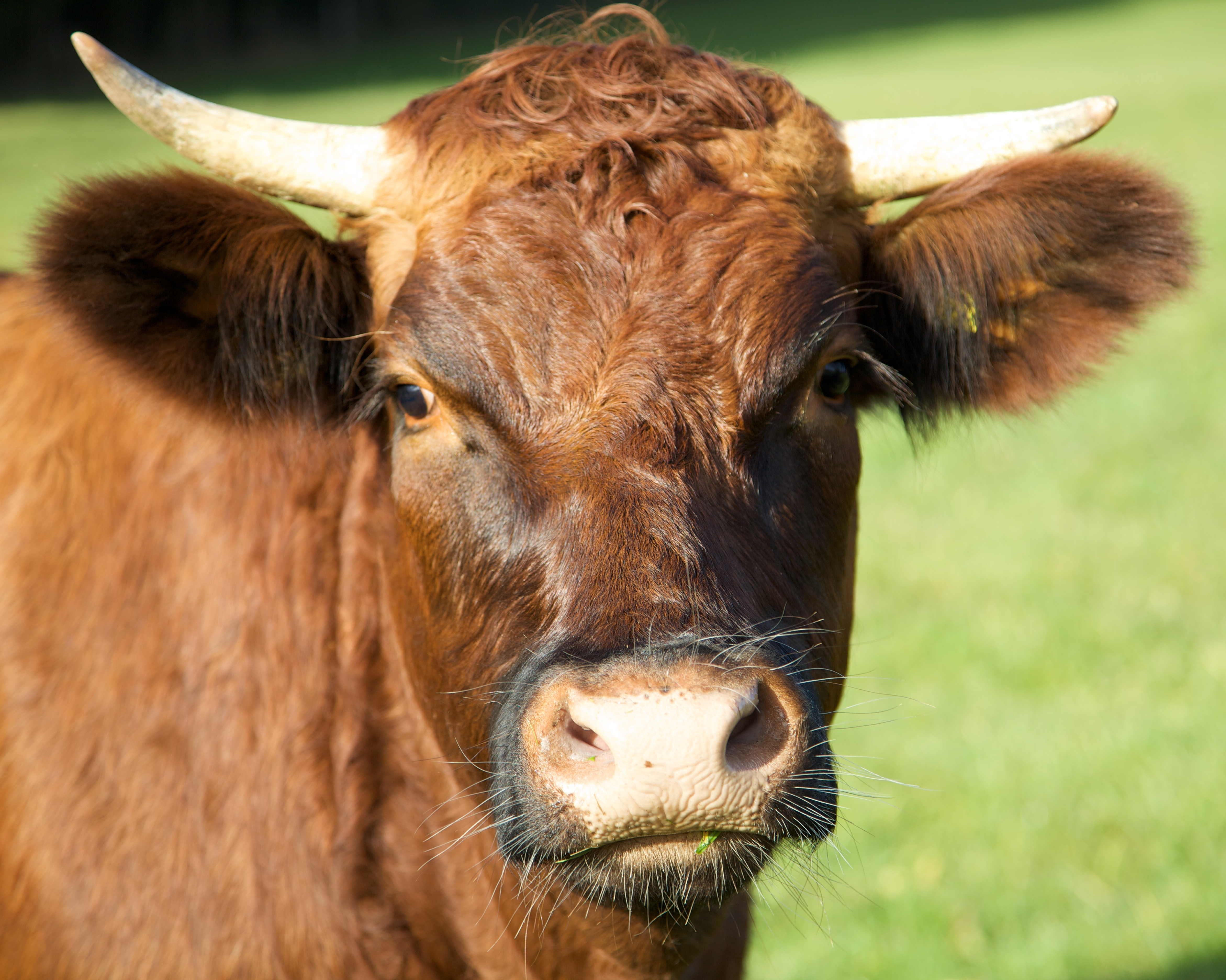 Junger Rothöhenviehbulle